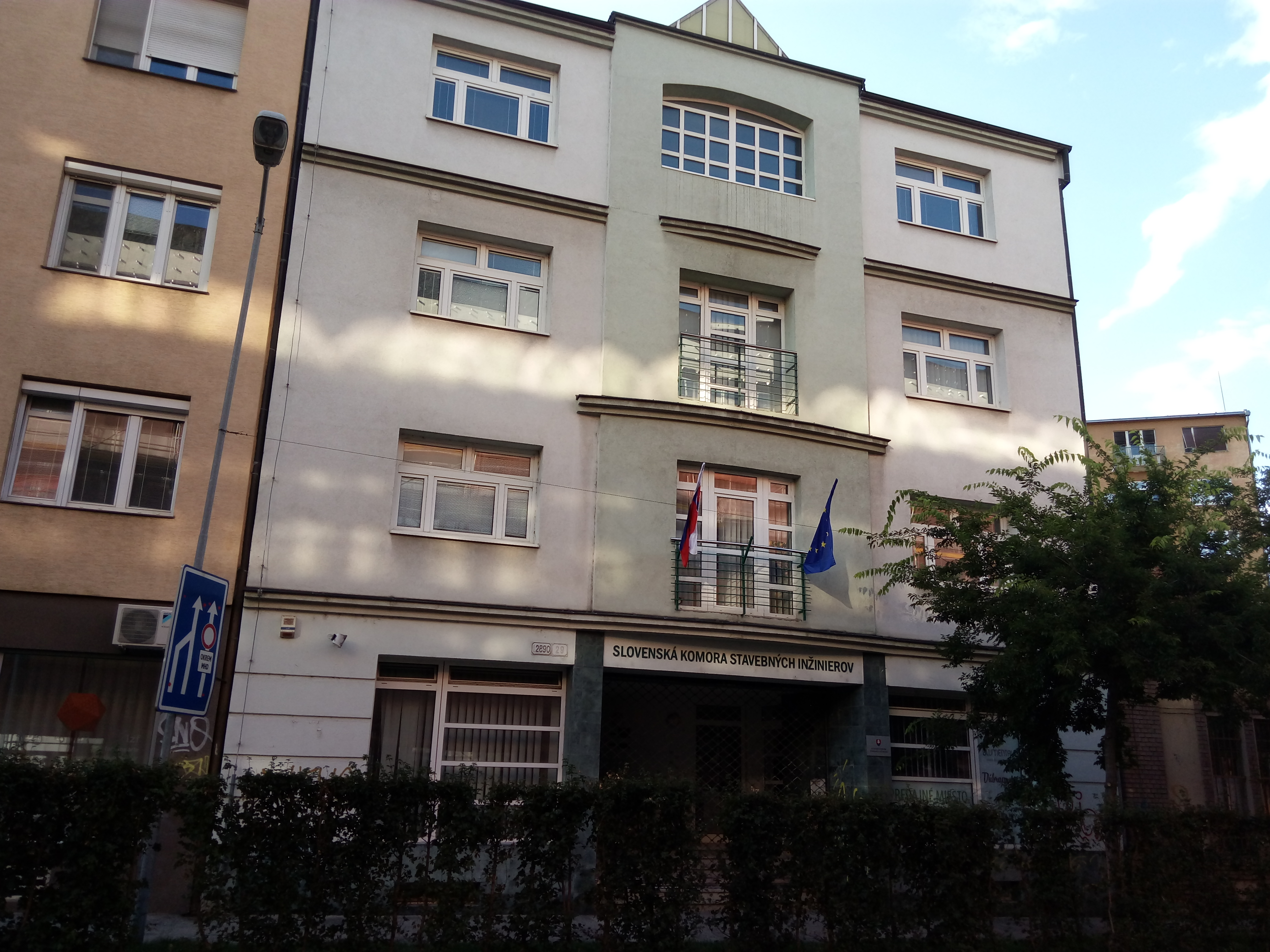 Mýtna 29, Staré Mesto, Bratislava